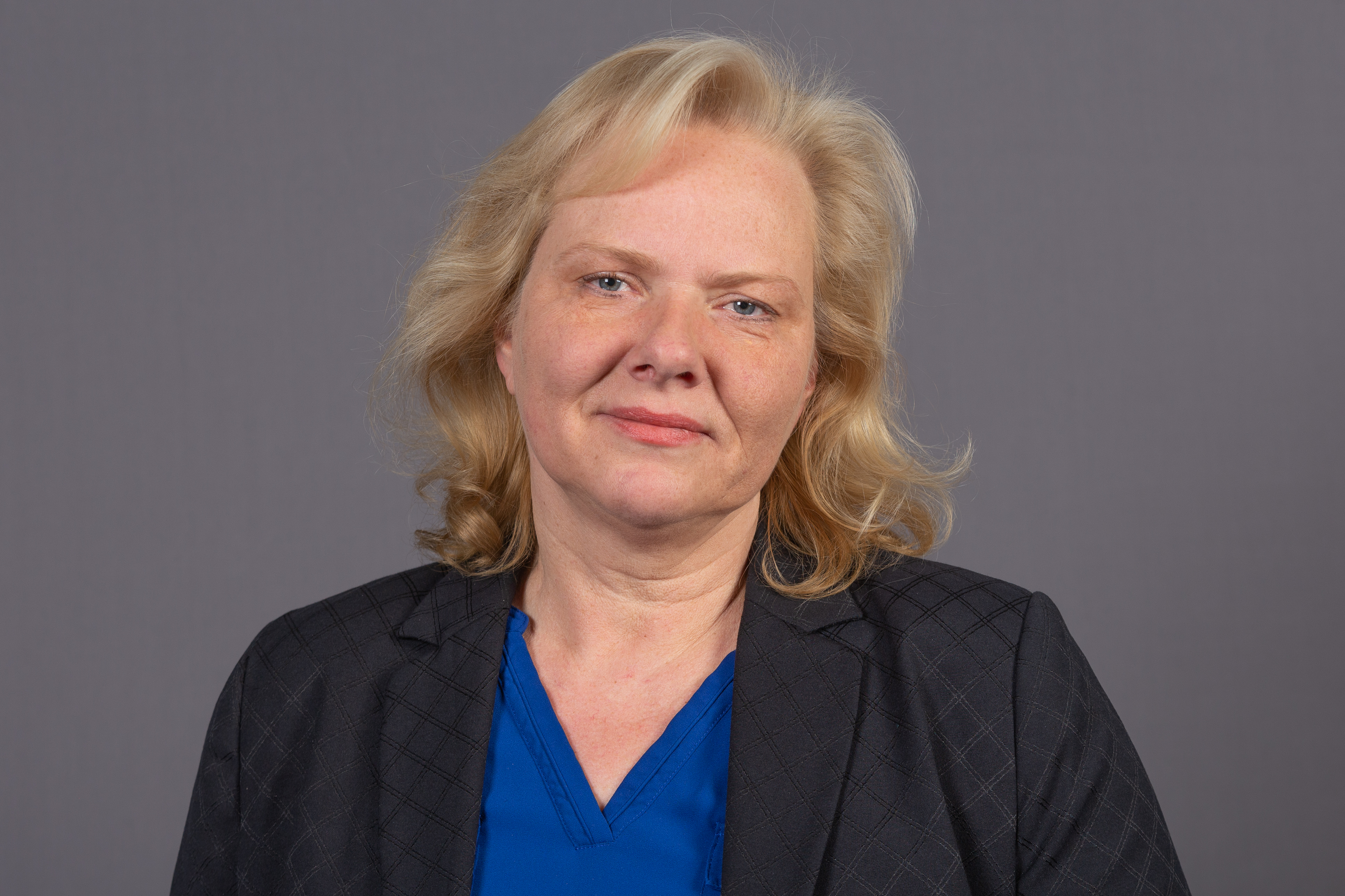 Deutscher Bundestag; Ulrike Schielke-Ziesing, AfD